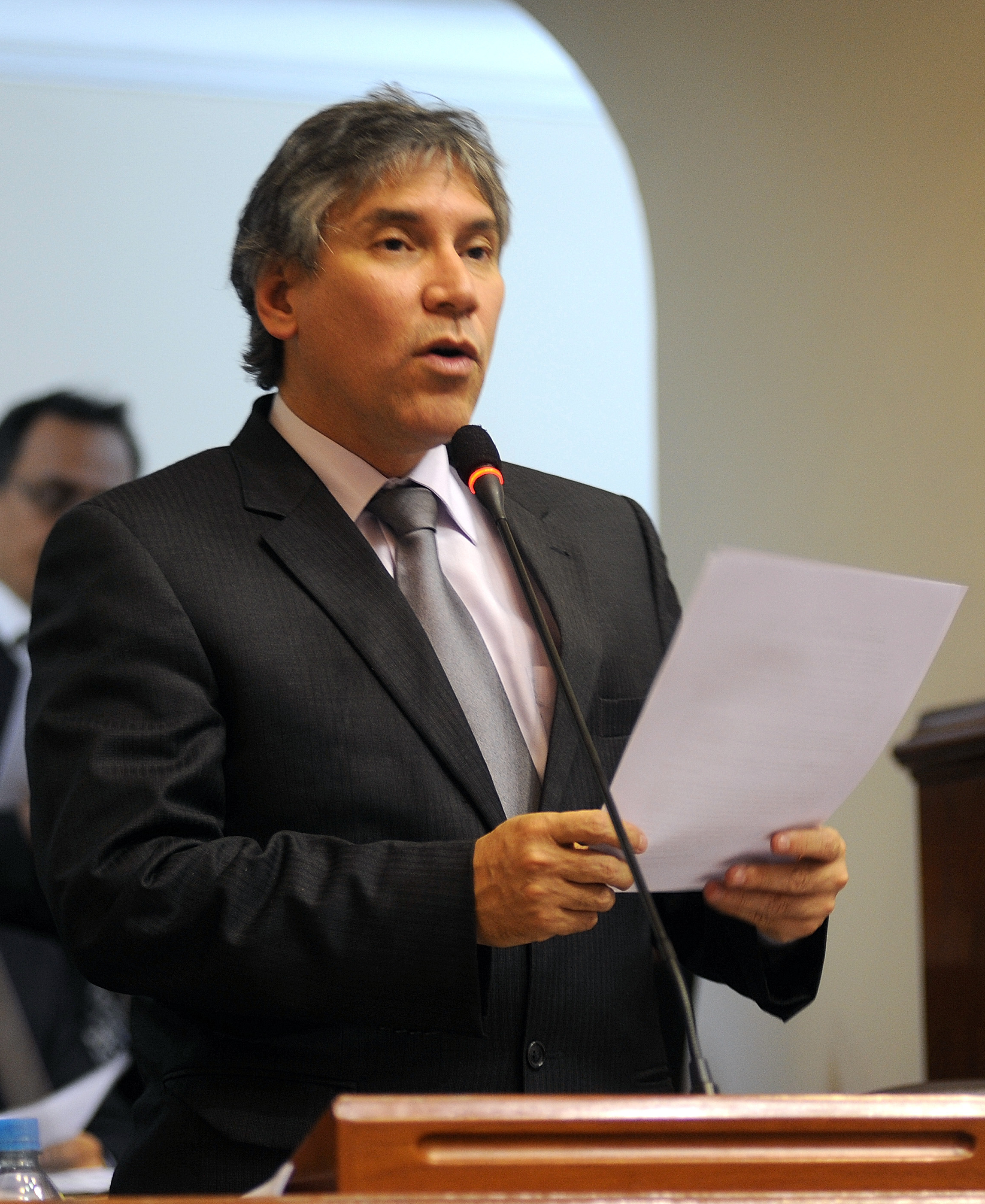 El congresista Aurelio Pastor Valdivieso fija su posición en el debate parlamentario realizado esta tarde por el Pleno.